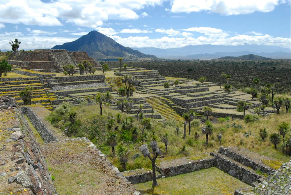 Zona Arqueológica de Cantona, Tepeyahualco, Puebla/ Archaeological Zone